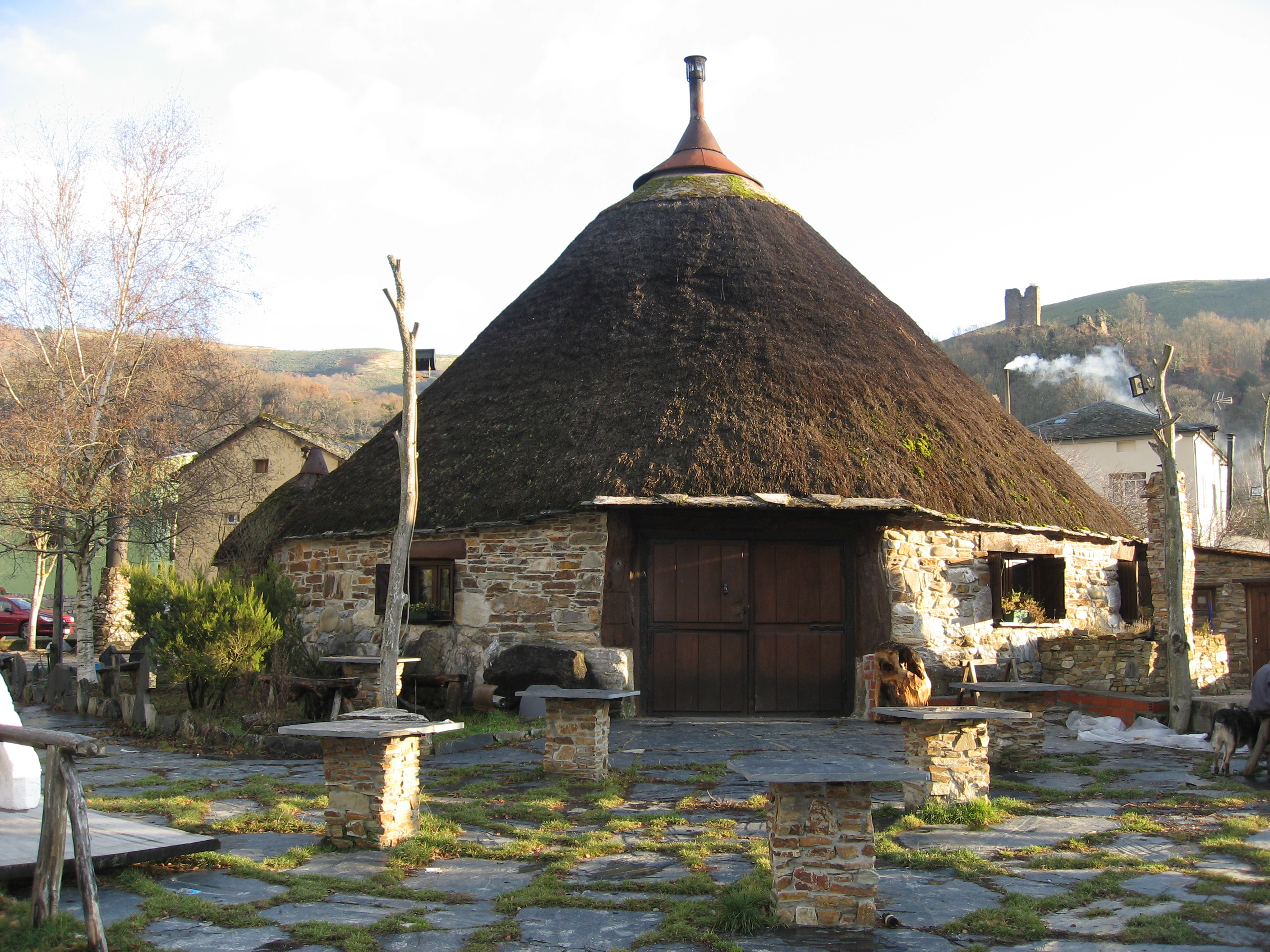 Palloza municipal de Balboa (El Bierzo, León, España).